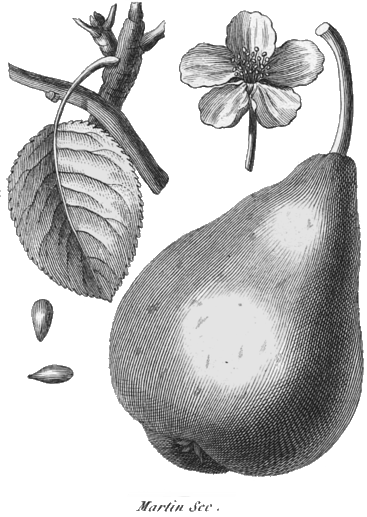 Rozier. Cours d'agriculture, tome 8, planche 6, martin-sec (poire)